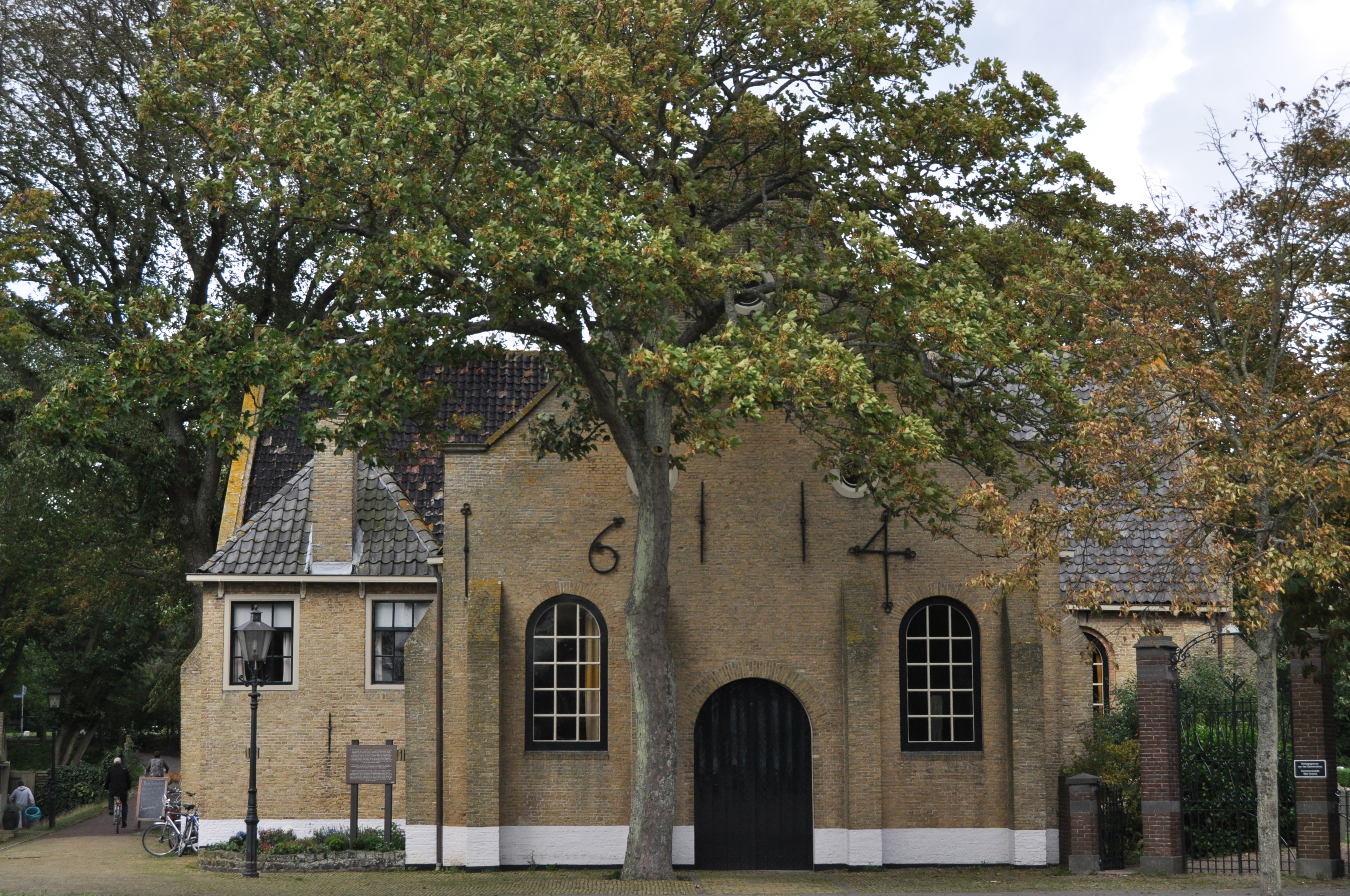 gebouwd in 1605 als zaalkerk,in 1647 uitgebreid tot kruiskerk.Opvallende interieurdetails: scheepsmast als pilaar, scheepsdeurtje als onderdeel van de kansel,nog originele licht- kronen met kaarsen,ouderlingenbanken met Bijbelteksten in oud-hollandse vertaling.Blauw-groene kleurstelling van de banken.Koperen doopvont,lezenaar op het koorhek en lezenaar op de kansel.